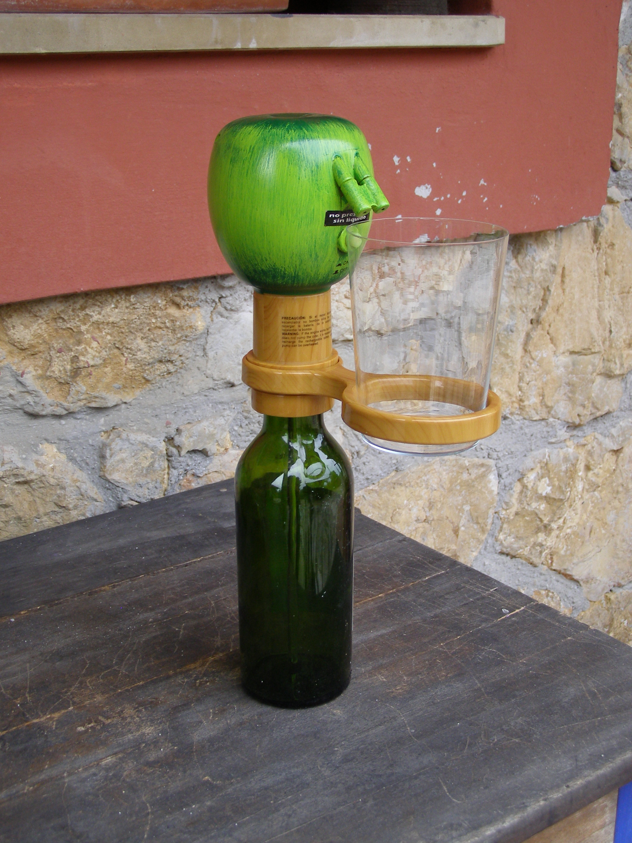 Escanciador eléctrico automático fabricado por la empresa asturiana Eolo Innova